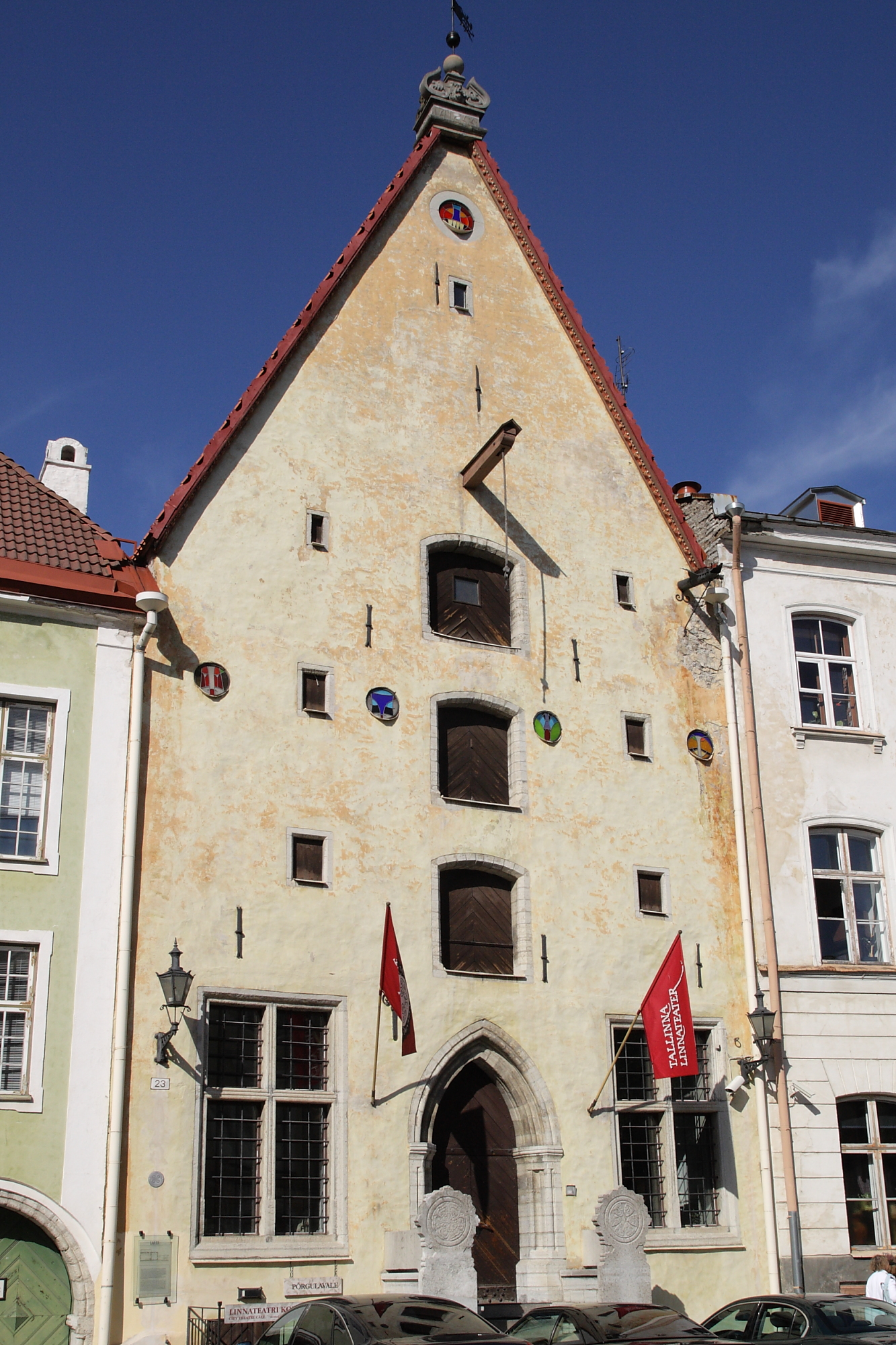 Tallinn, elamu Lai 23 hooviansambliga, 14.-20.saj